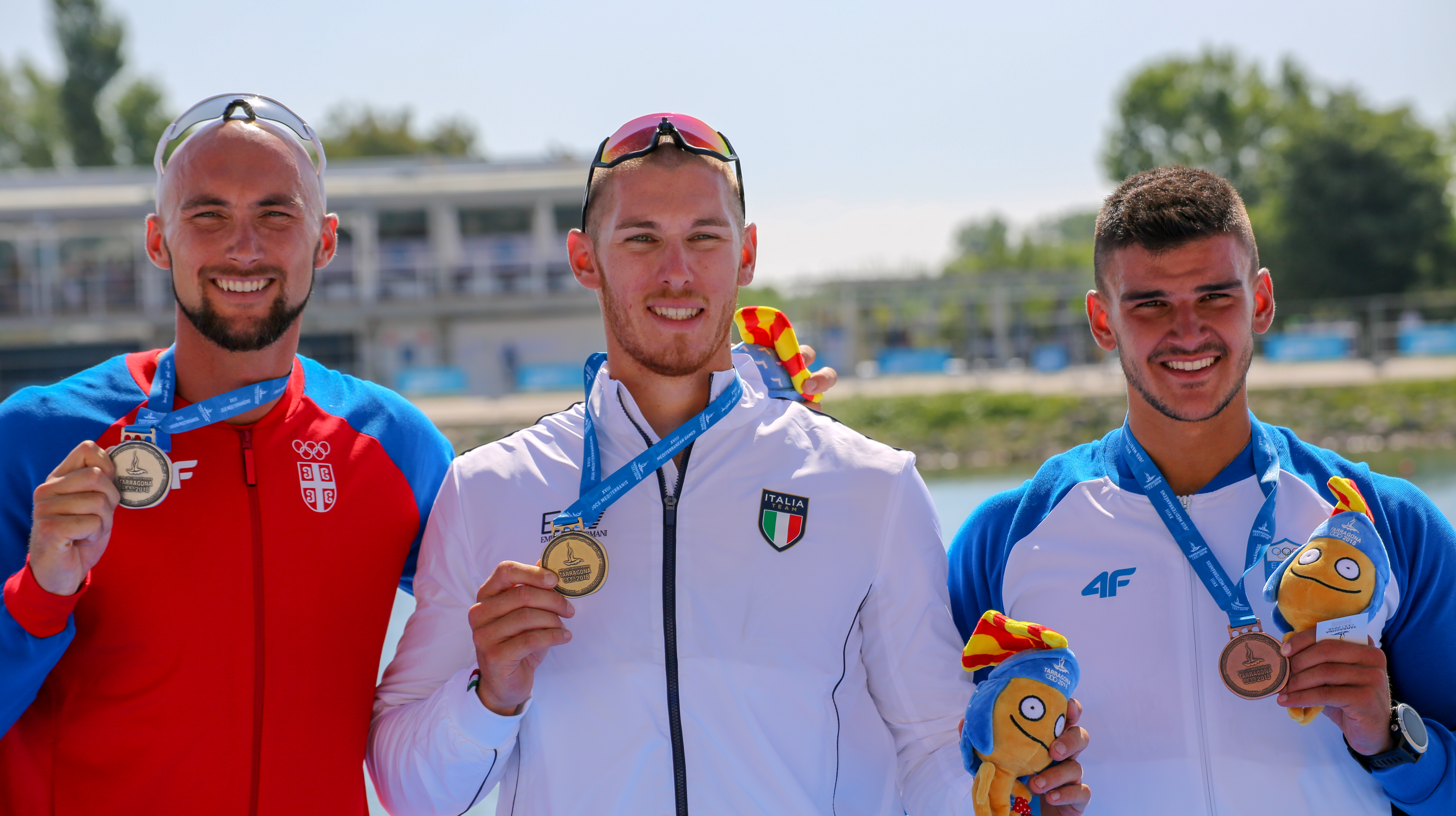 Marko Marjanović, Luca Rambaldi y Spyridon Kalentzis, plata, oro y bronce en los Juegos del Mediterráneo 2018